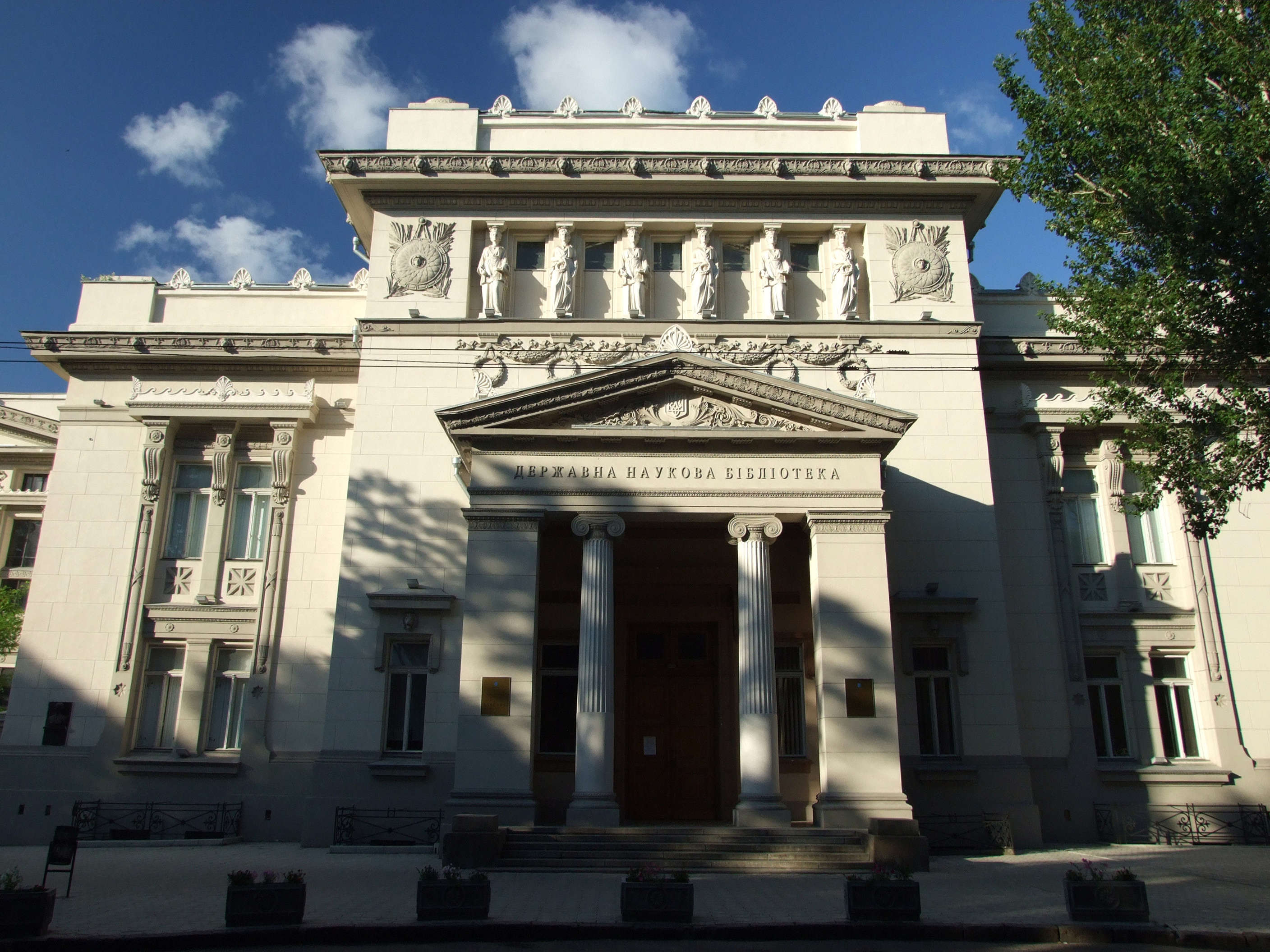 Одеська національна наукова бібліотека ім. М.Г. Горького (первісно Одеська міська імені імператора Миколи ІІ-го публічна бібліотека), архітектор Федір Павлович Нестурх, проект 1904 р.; Будівництво 1905-1906 рр.; Відкриття, 1907 р.